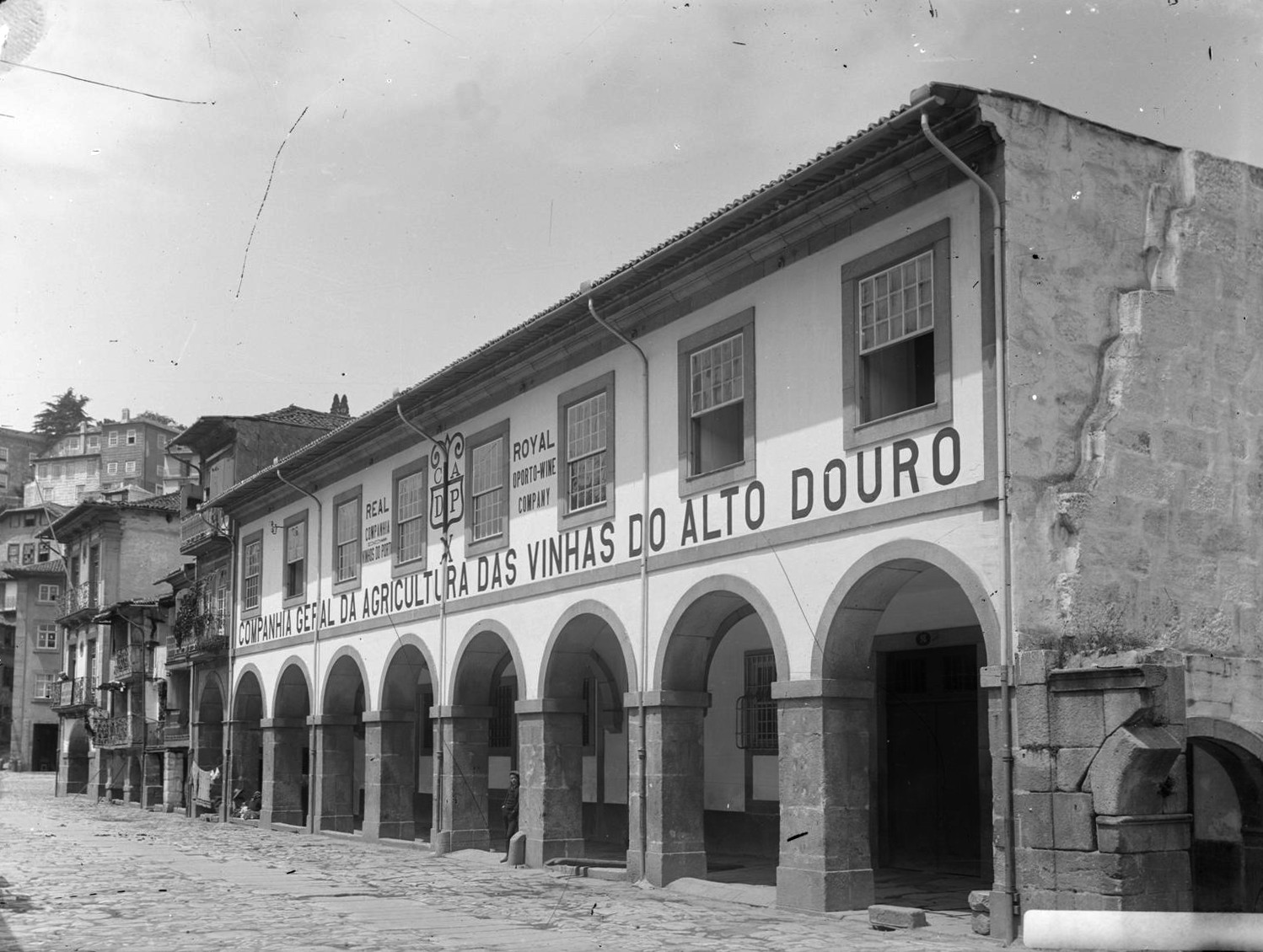 Vista geral dos armazéns que se situavam na rua de Miragaia, 98/99..